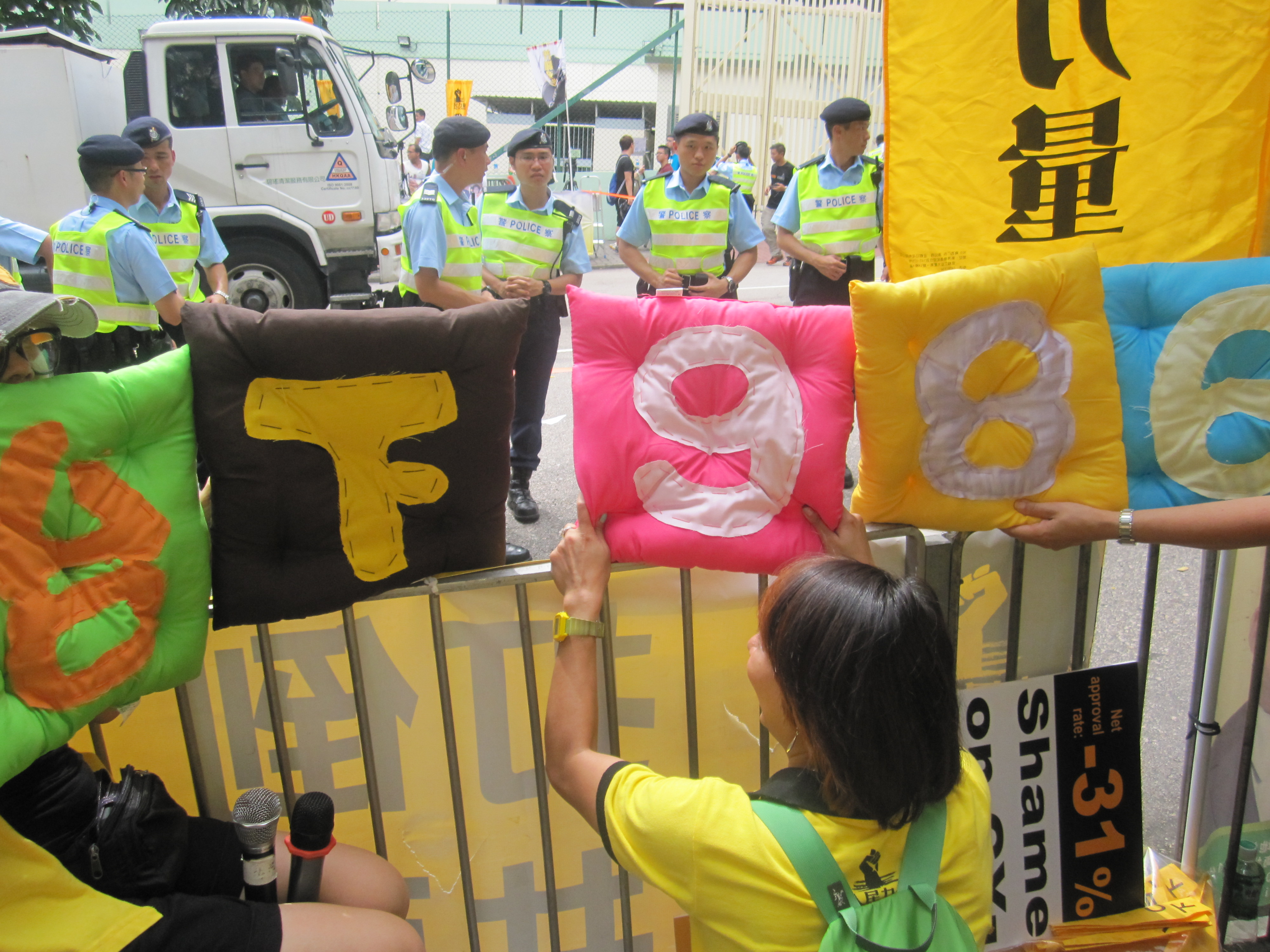 2013年8月18日，梁振英「落區」到觀塘。人民力量通宵排隊進場，又在會場外指罵梁振英座駕。人民力量支持者別具創意，「689下台」示威軟墊顏色鮮艷又可愛。